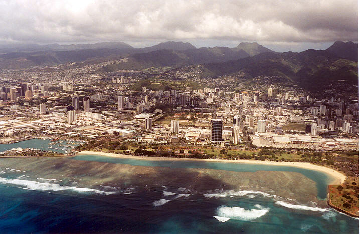 Ala Moana and Makiki